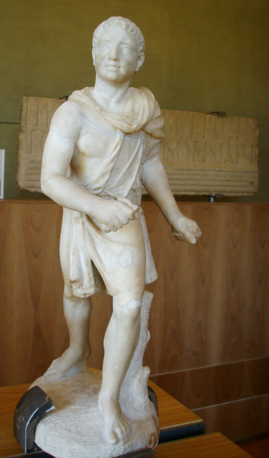 Statuetta forse di Ulisse, del II sec. d.c., conservata a Firenze.